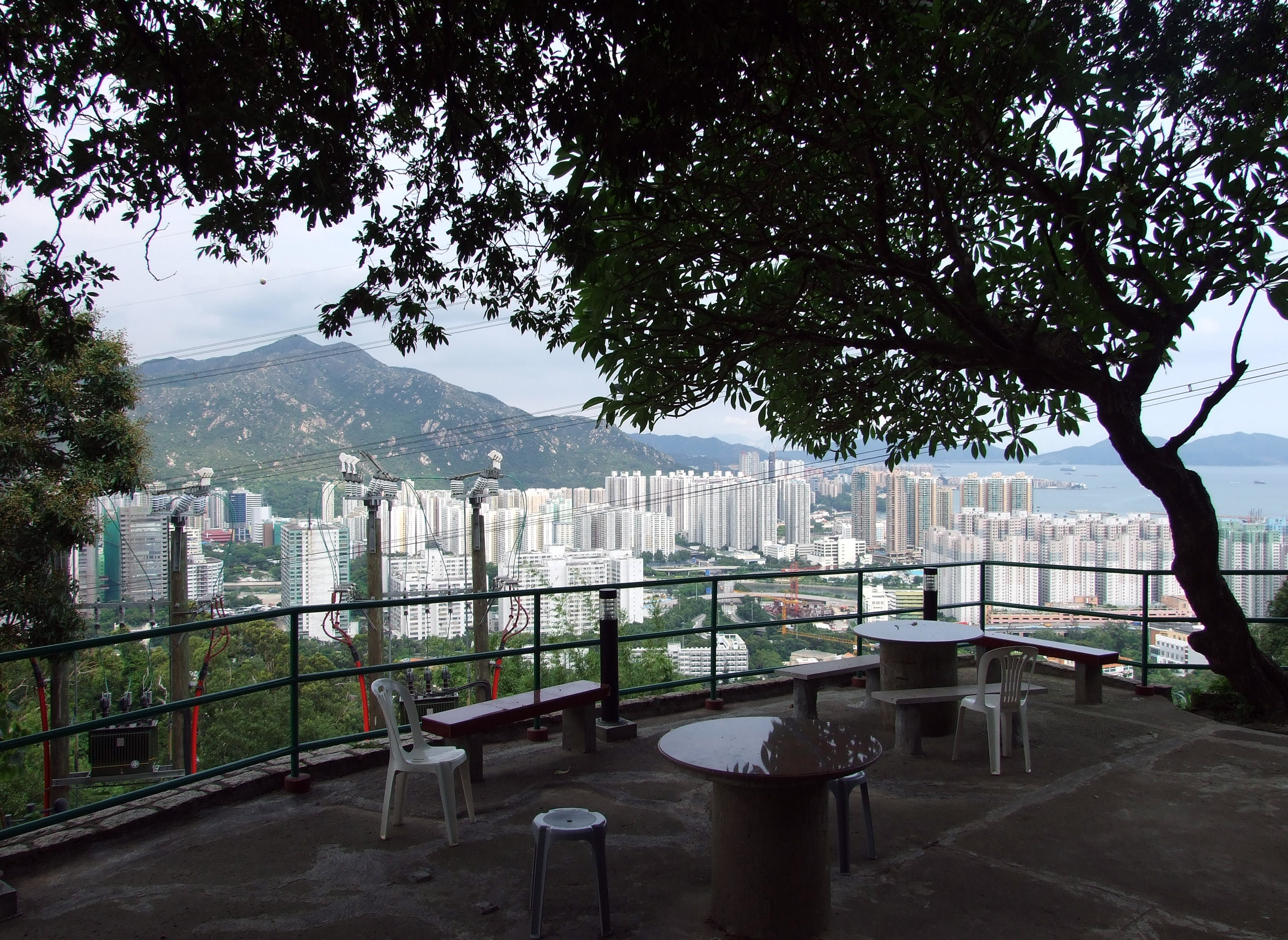 中文（香港）: 青山禪院電影《龍爭虎鬥》拍攝場地